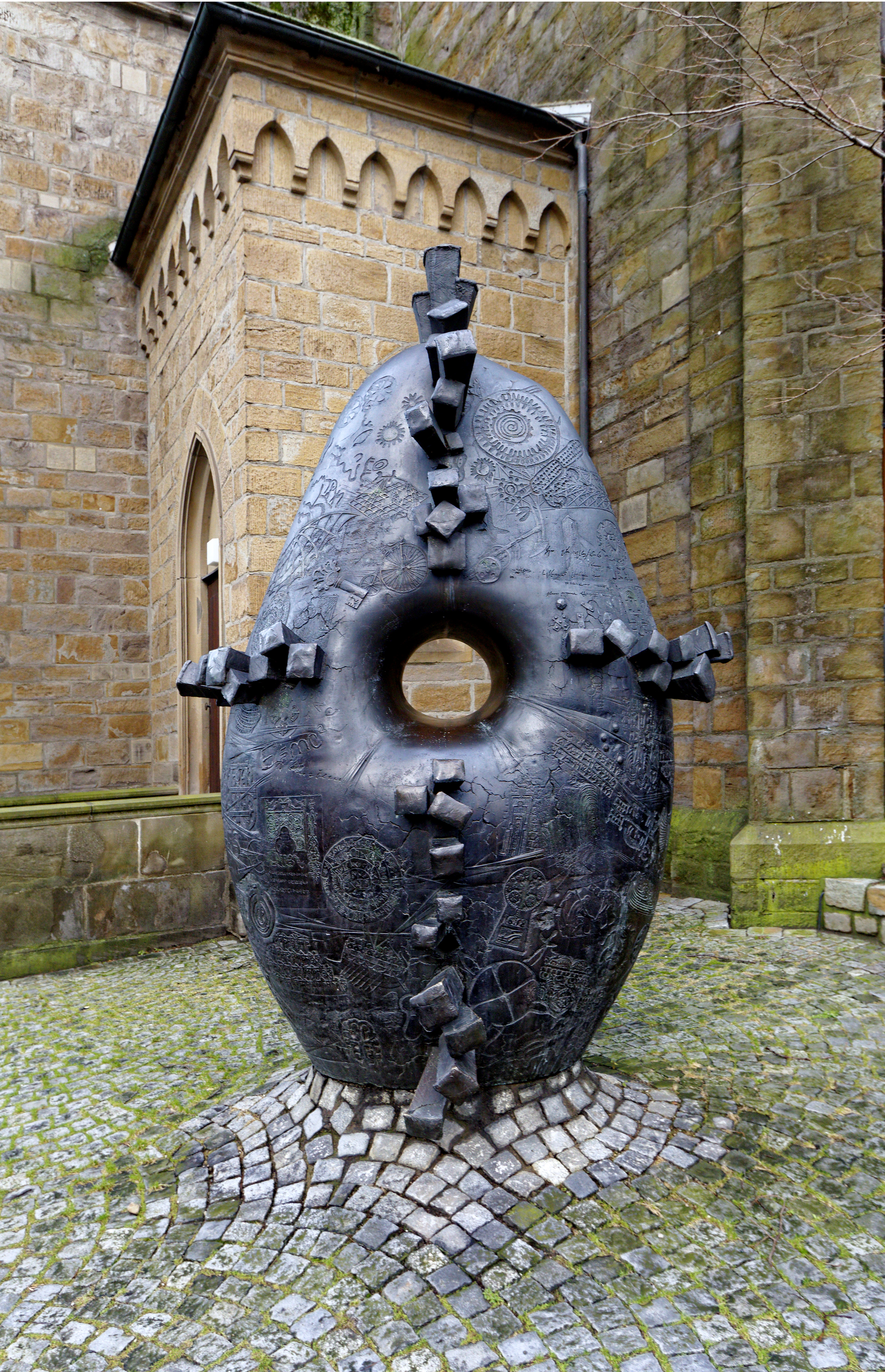 Albert Vardanyan Plastik Pulsar, Bochum Linden, Hattinger Str. 786